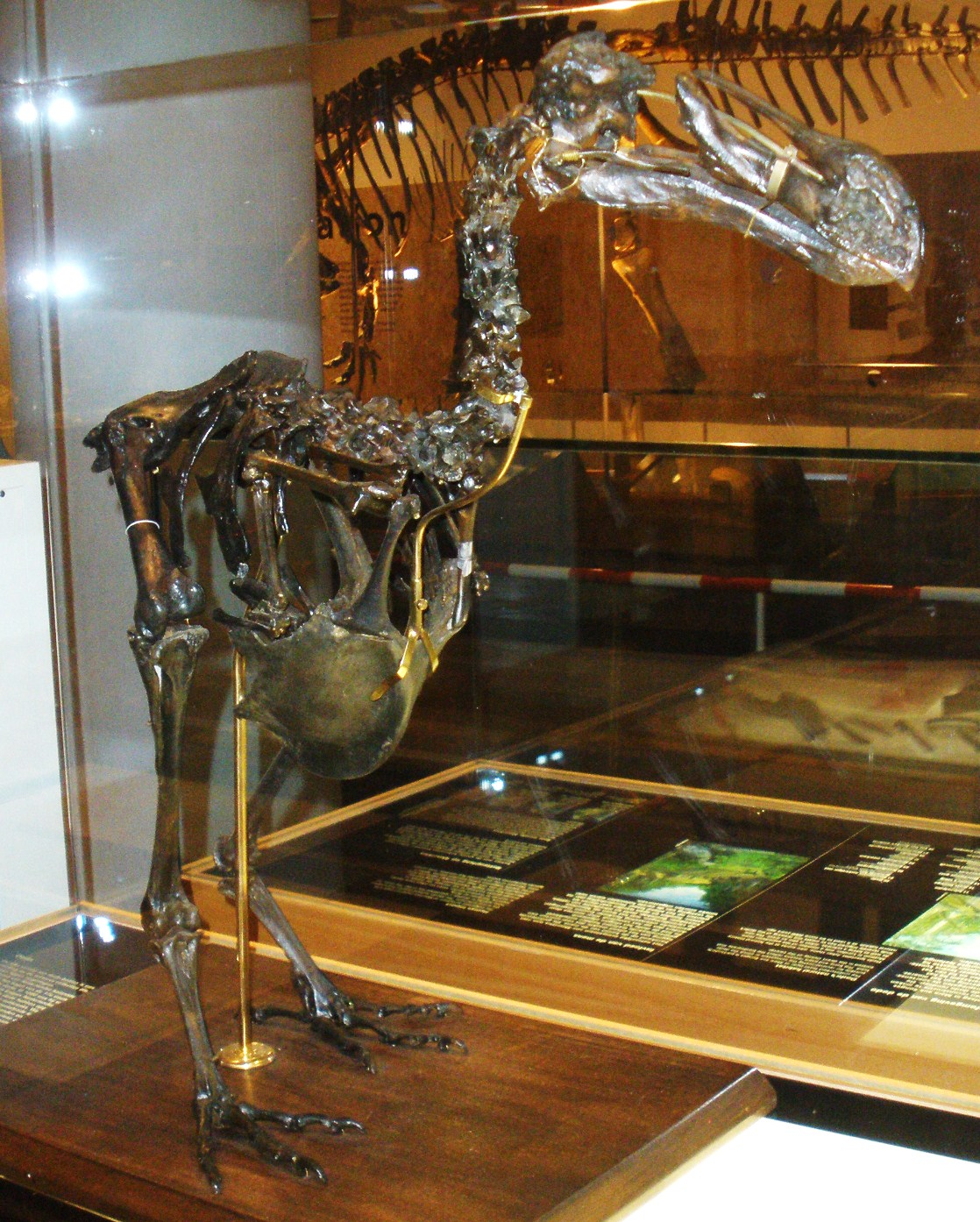 Skeleton of Raphus, an extinct bird- Took the photo at Naturalis museum, Leiden